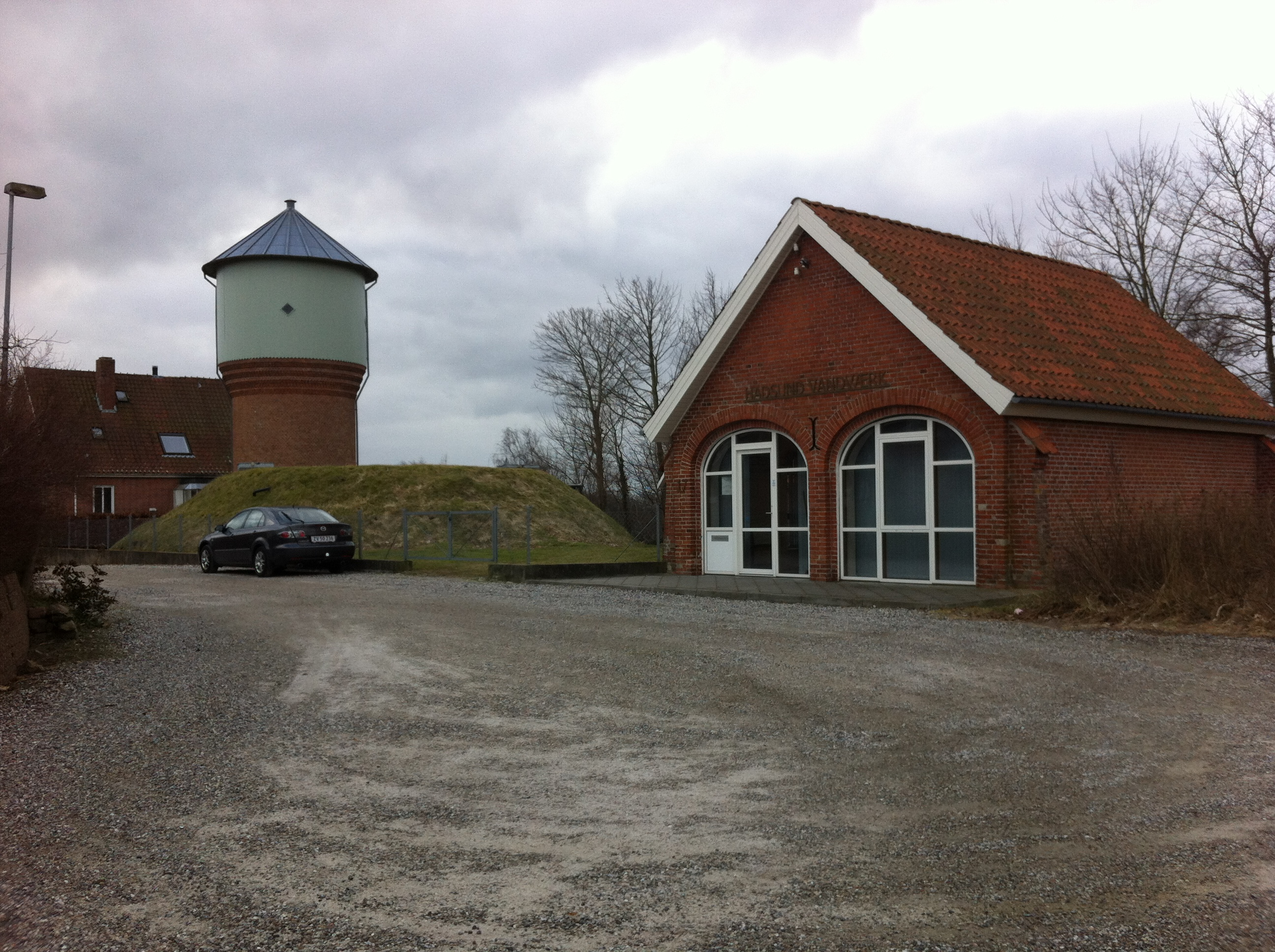 Hadsund Vandværk og Vandtårn i Vandværksvej